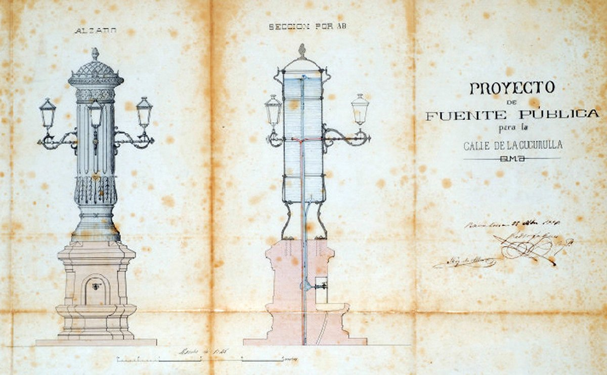 Proyecto de fuente pública para la calle Cucurulla (1886), de Pere Falqués.